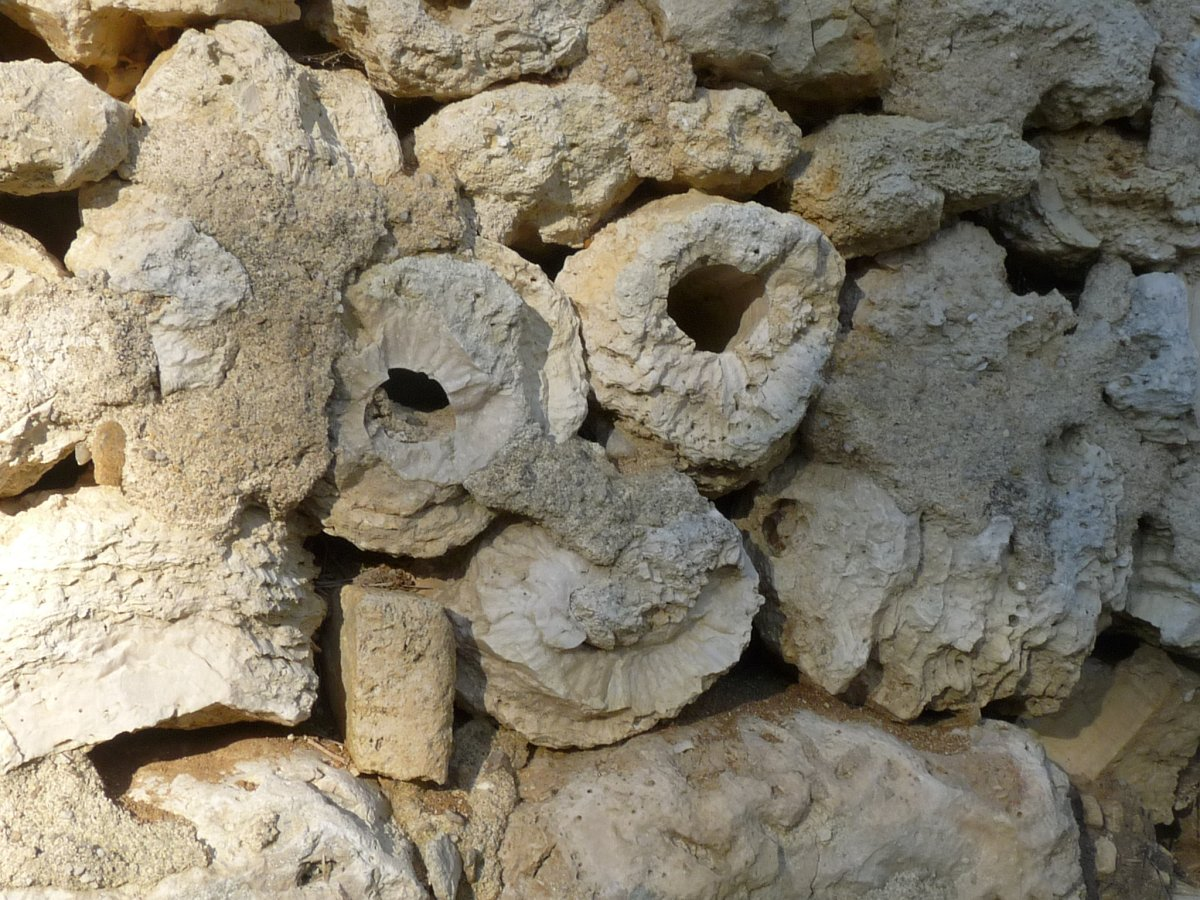 Murs en rudistes à Phélipaud, Lamérac, Charente, France